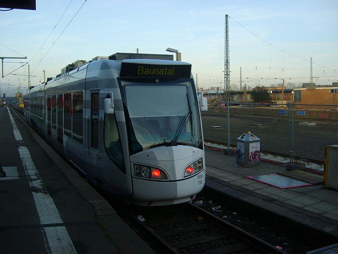 RegioTram Treibwagen 758 im Kasseler Hauptbahnhof